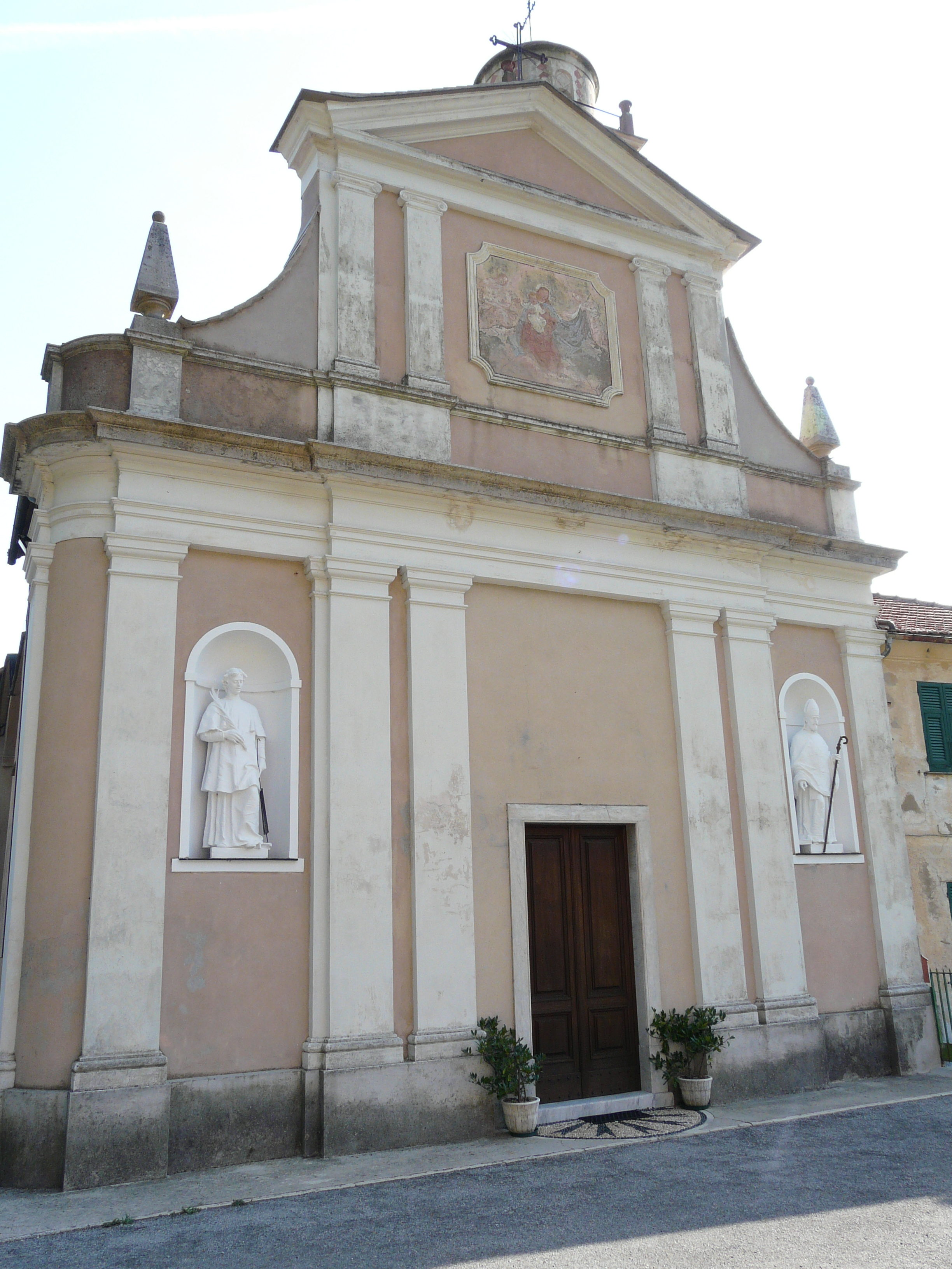 Chiesa di San Lorenzo di Torbi, Ceranesi, Liguria, Italia